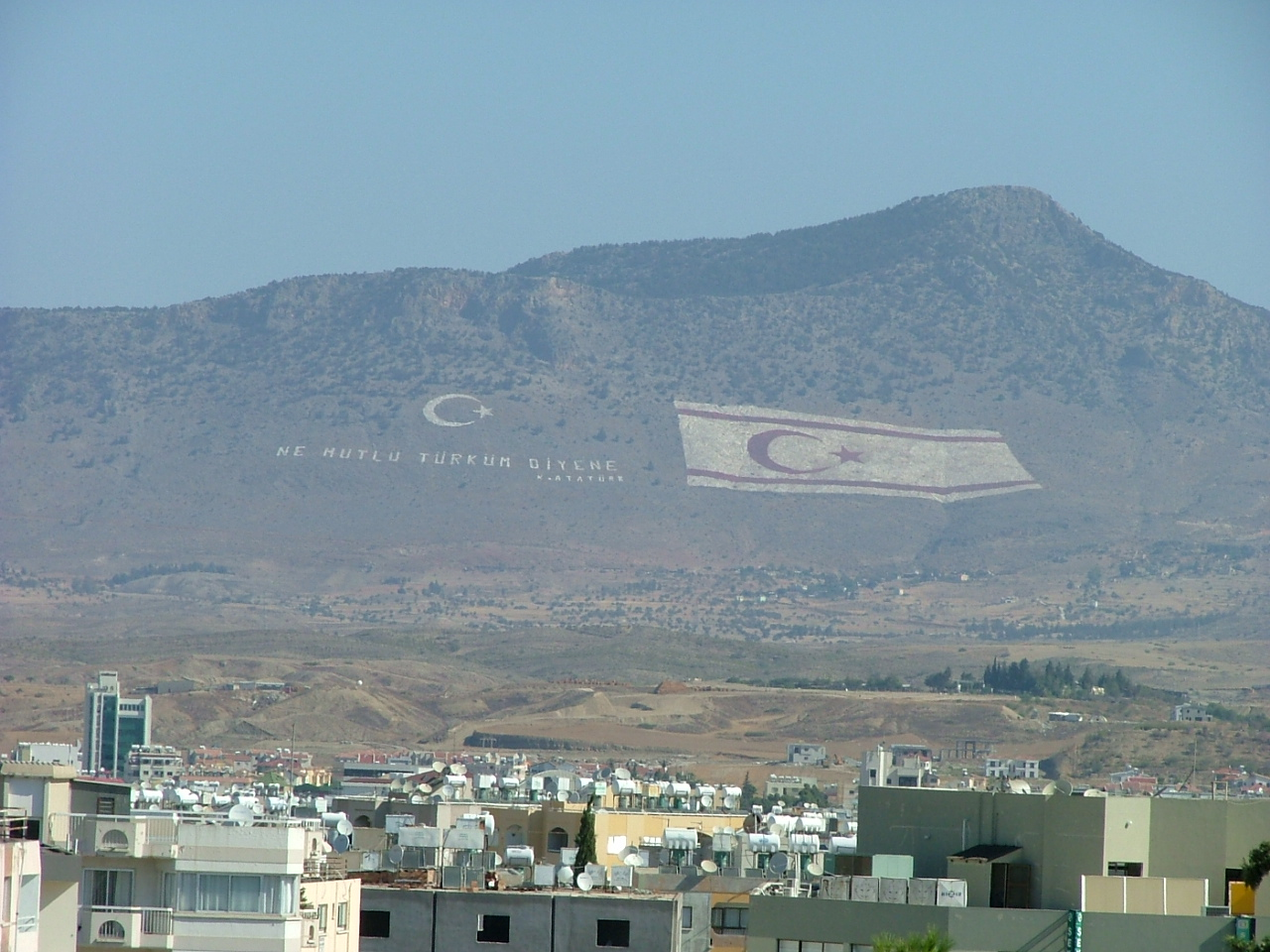 Beşparmak Dağları'nda Kuzey Kıbrıs bayrağı ve Mustafa Kemal Atatürk'ün "Ne mutlu Türküm Diyene" sözü.